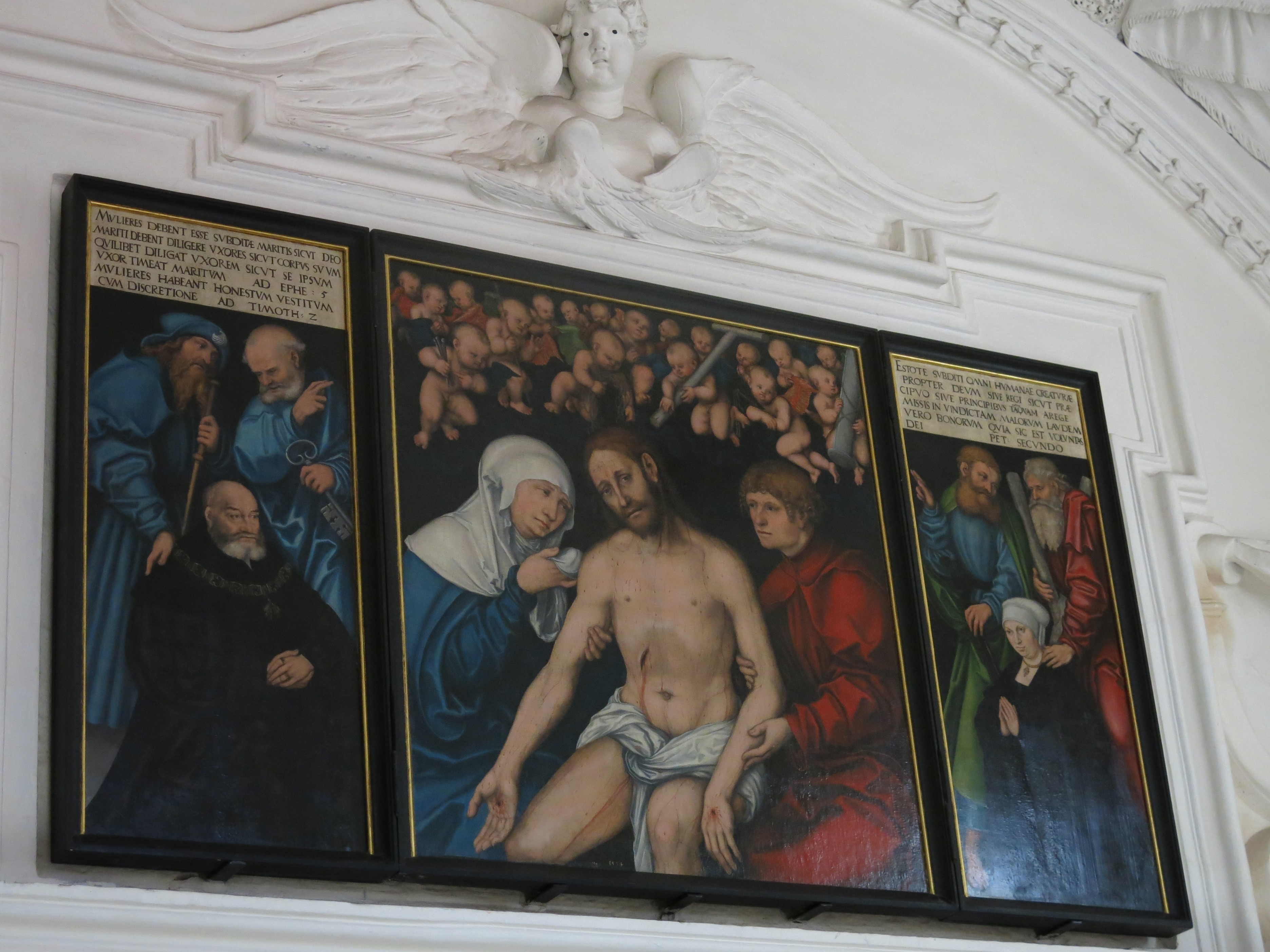 Lucas Cranach d. Ä., Altartriptychon in der Grabkapelle Georgs des Bärtigen, Meißner Dom. Im Mittelbild Christus nach der Kreuzabnahme, wie lebend dargestellt, mit Maria und Johannes; links Herzog Georg mit den Aposteln Jakobus und Petrus, rechts seine Frau Barbara mit den Aposteln Paulus und Andreas. Petrus deutet von links auf das rechts oben geschriebene Bibelwort (1 Petr:13-15), Paulus von rechts auf die Bibelworte links oben (Eph 5:22.28.33; 1 Tim. 2:9).